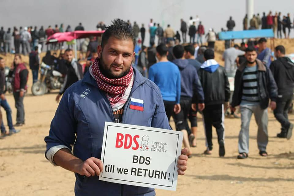 صورة من مسيرات العودة و فك الحصار - الحدود الشرقية بمدينة رفح جنوب قطاع غزة